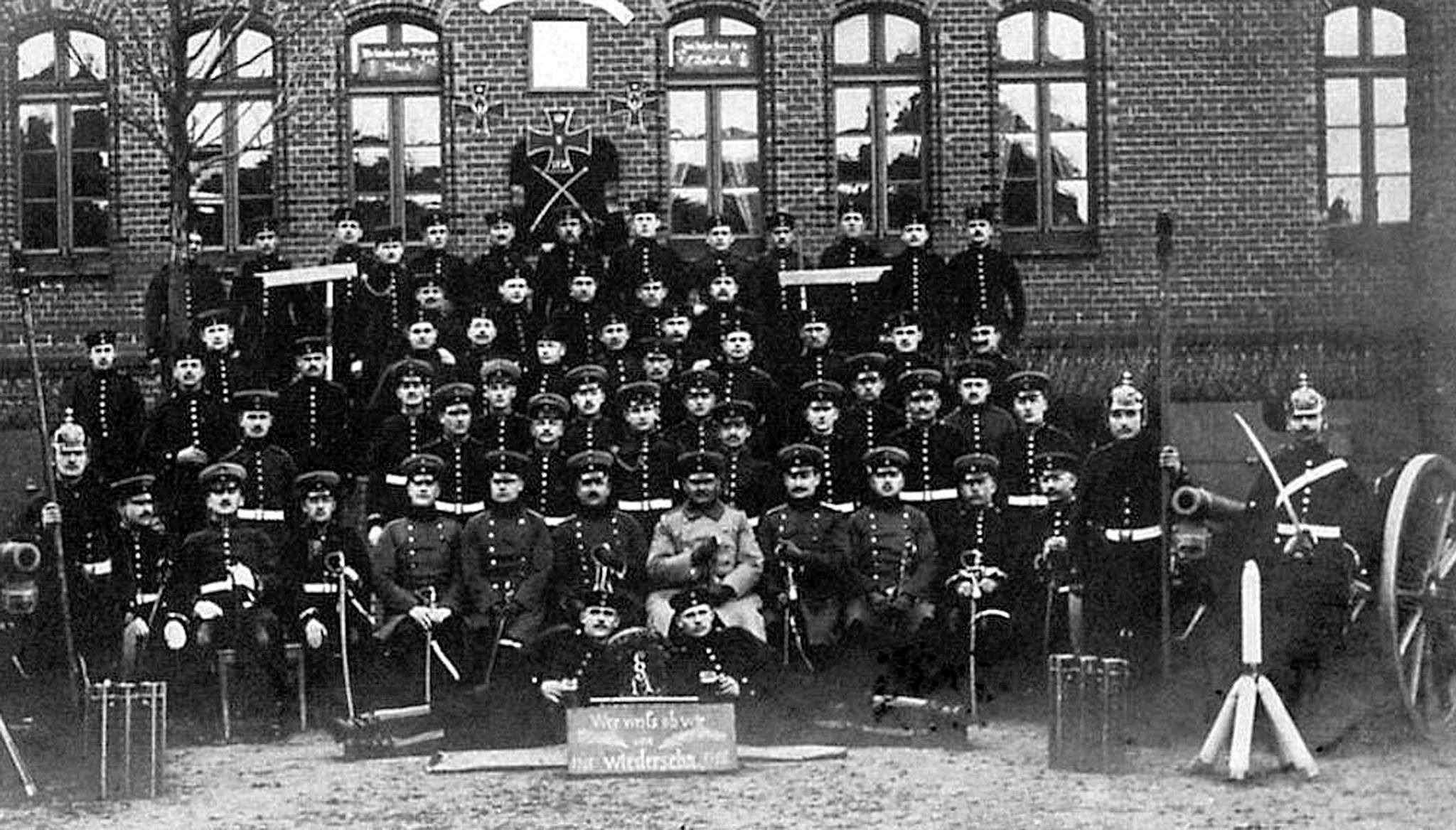 Pamiątkowa fotografia 2 Górnośląskiego Pułku Artylerii Polowej nr. 57.